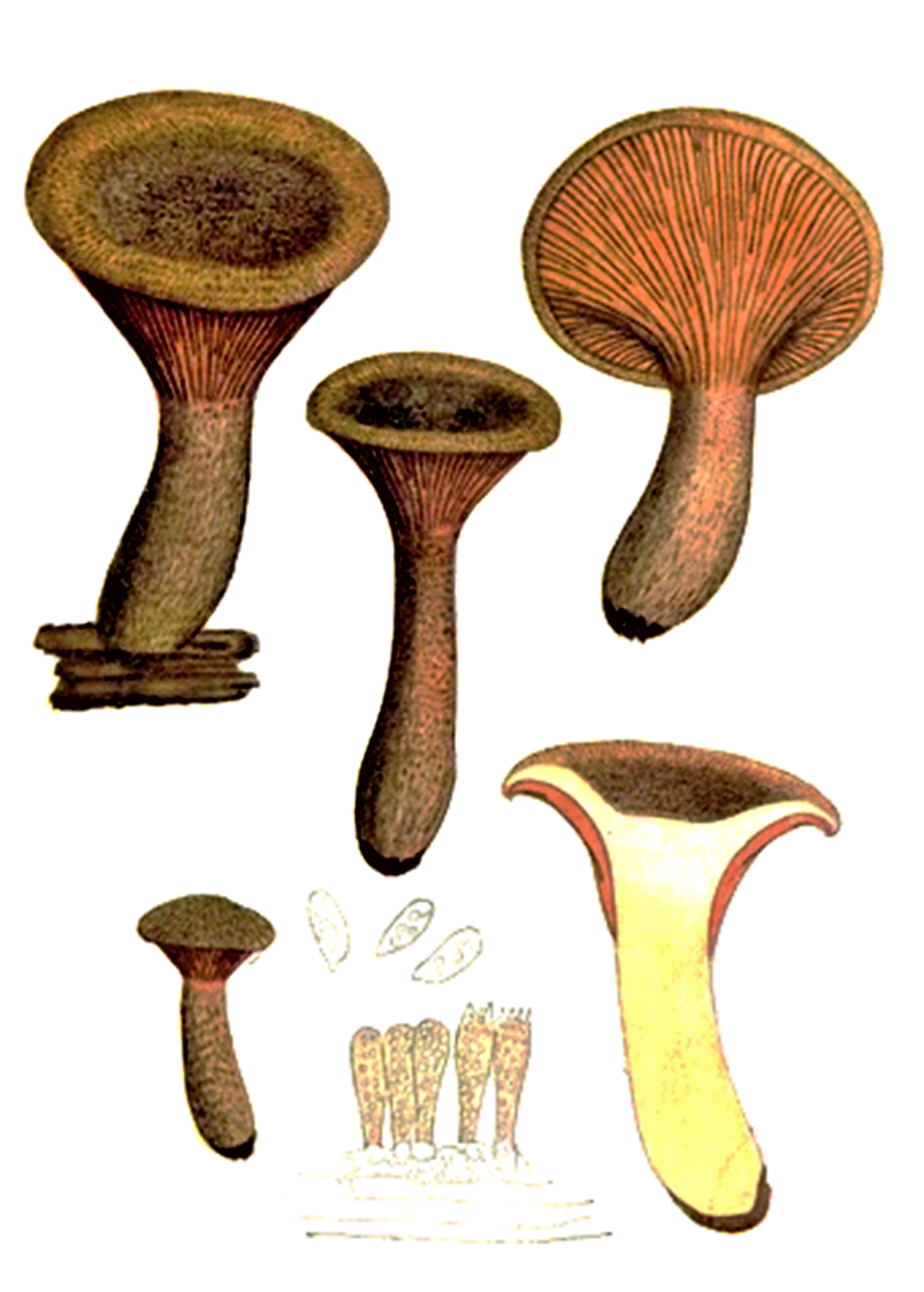 Giacomo Bresadola: Cantharellus aurianitiacus (Wulfen : Fr.) Maire (1921), heute Hygrophoropsis aurantiaca Fr. (1821)